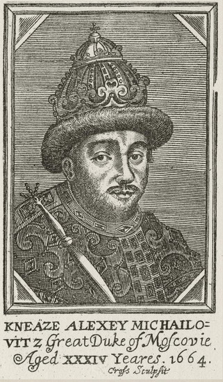 Kneaze Alexey Michailovitz. Great Duke of Moscovie. Aged XXXIV yeares. Алексей Михайлович (портрет Царя Алексея Михайловича, скопированный с портрета Михаила Федоровича, гравюра, 1647) Автор: Олеарий Адам Источник иллюстрации: Д.А. Ровинский. Материалы для русской иконографии (в 12 выпусках). СПб.: Экспедиция заготовления государственных бумаг, 1884-1891 Место иллюстрации в источнике: илл. 28 Время создания оригинала: 1647